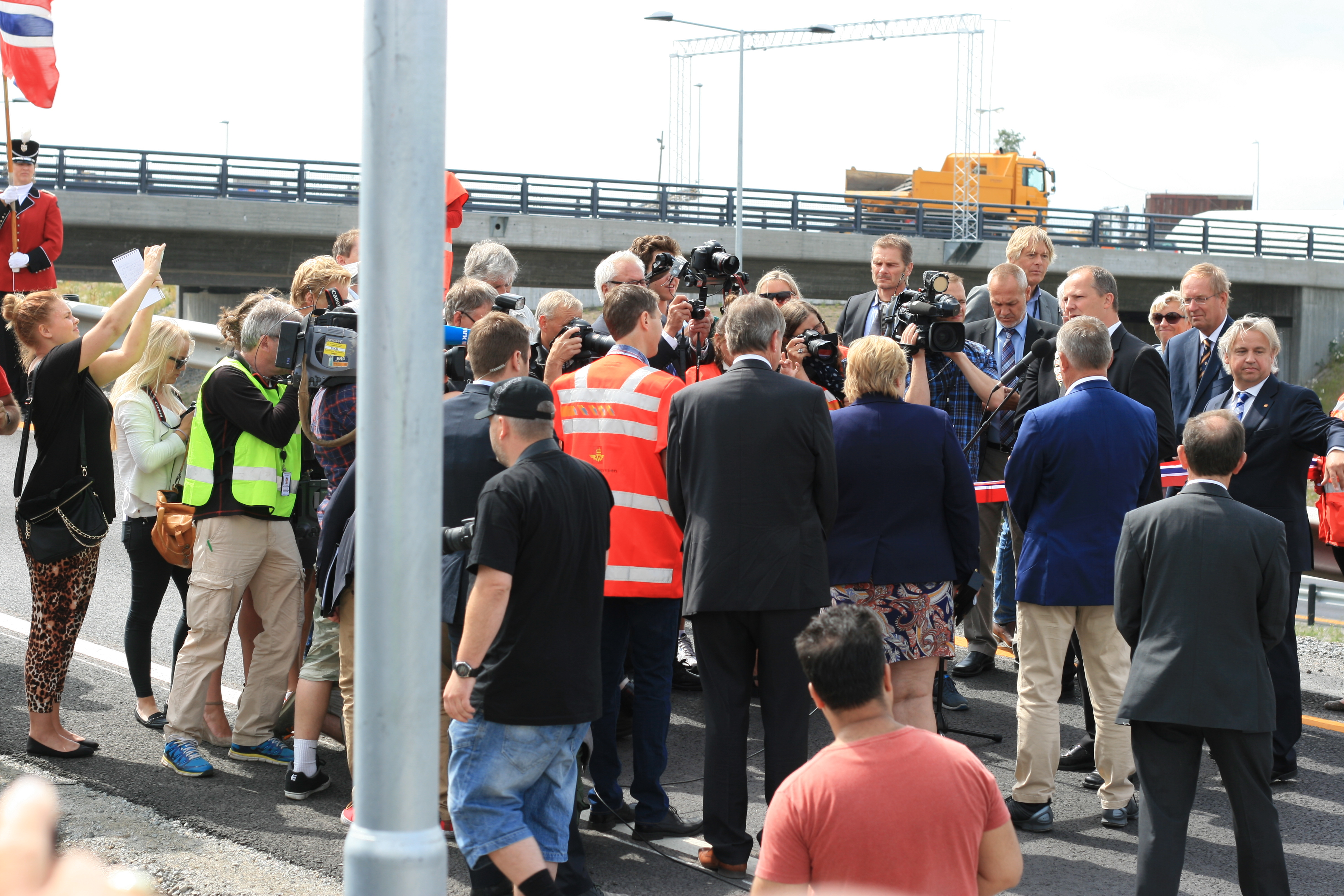 Klart for snorklipping ved åpningen av E18 i Vestfold.